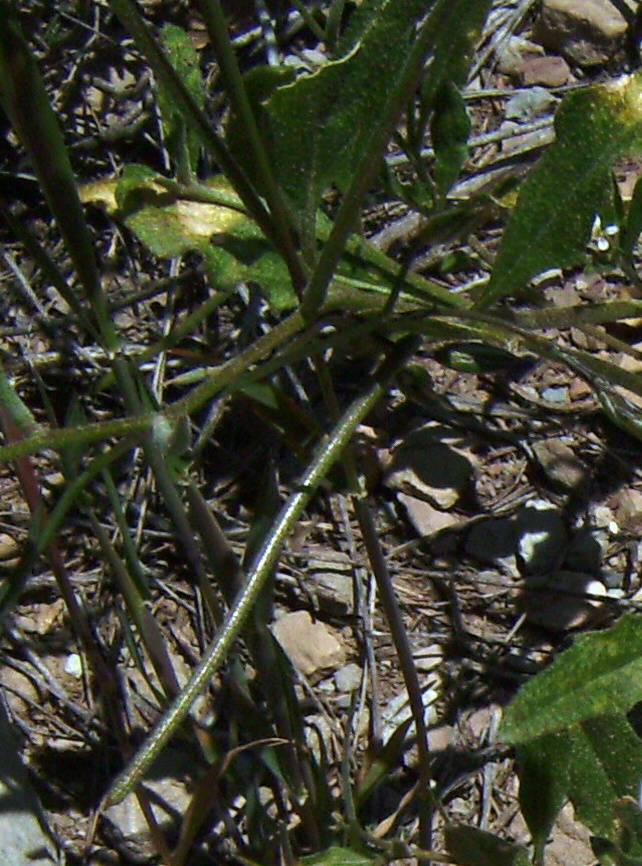 Silique from Malcolmia africana, Castelltallat, Catalonia